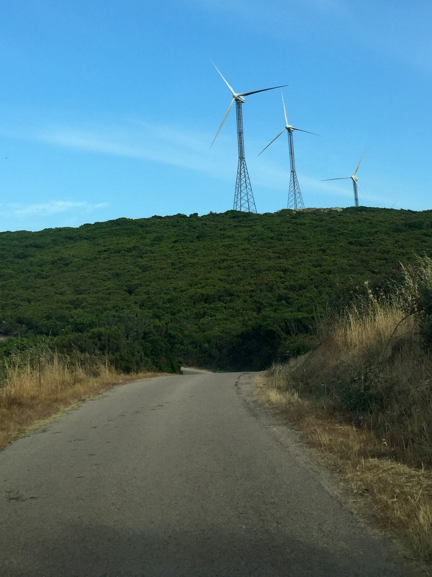 Gallura, 2016 (Sardaigne).